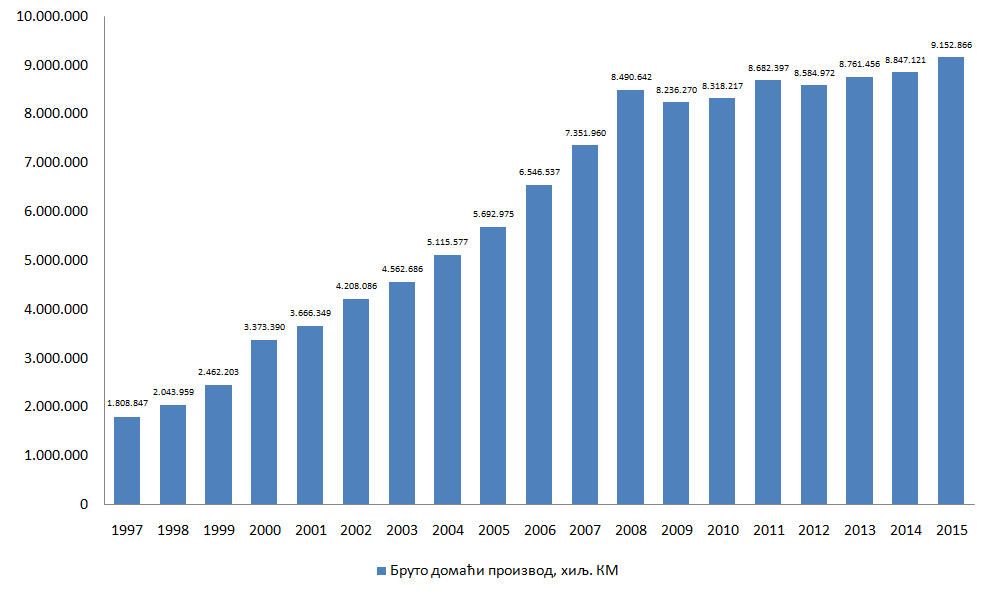 Бруто домаћи производ Републике Српске по текућим цијенама (1997—2015)